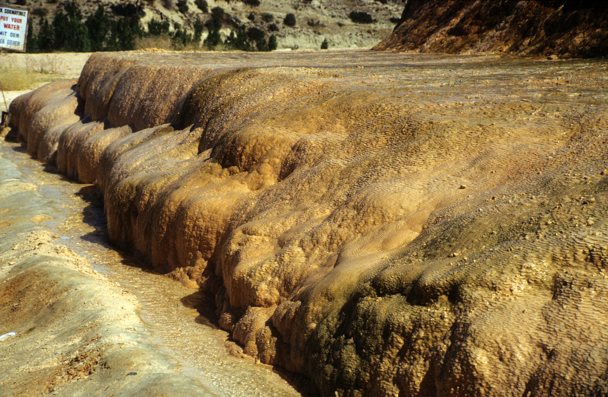 Karahayit, Ablagerungen der eisenhaltigen Quelle nahe Pamukkale, Türkei